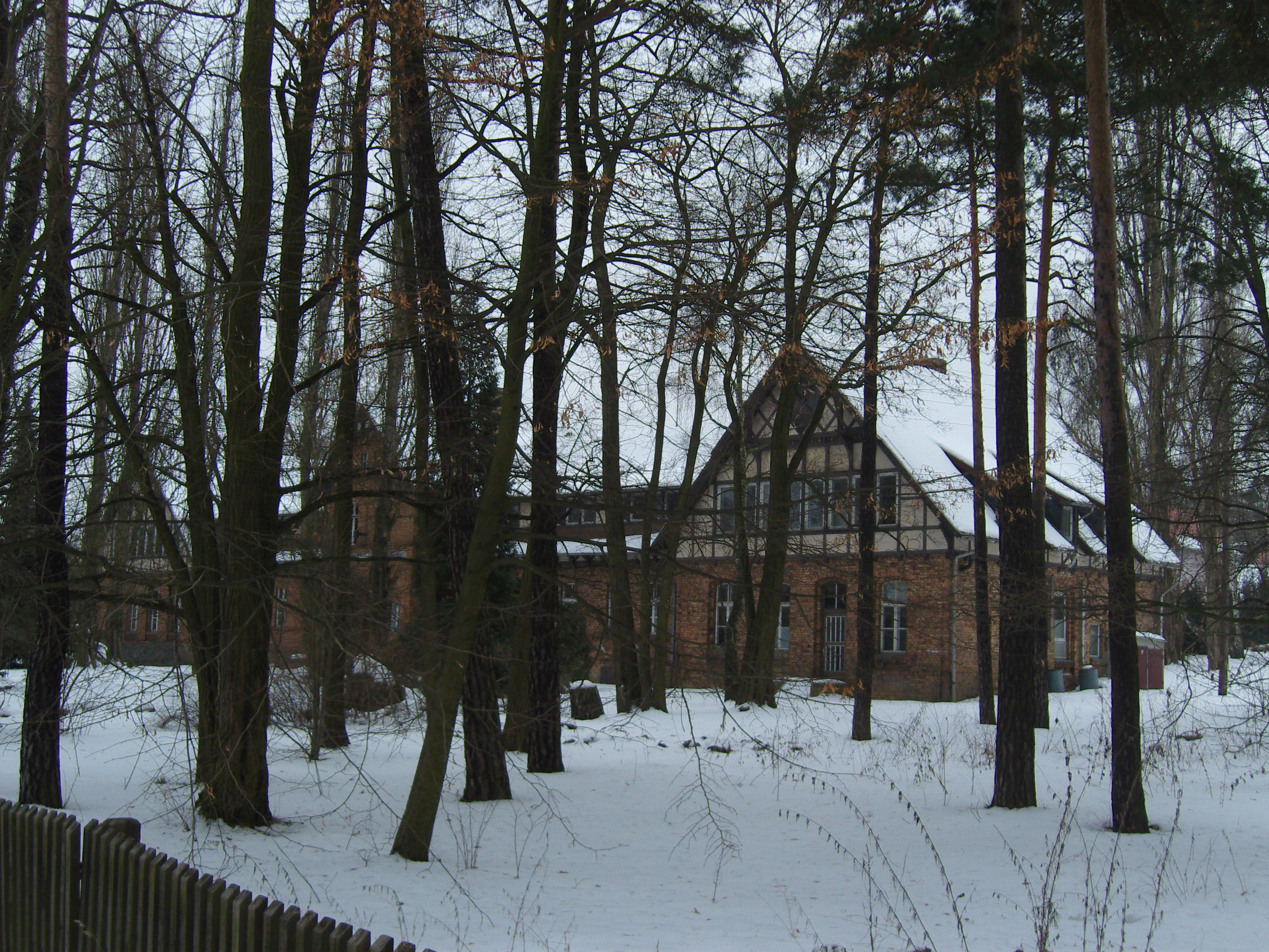 Lehrlingwohnheim in Lauchhammer in der Grünhauser Str. 19, Baudenkmal